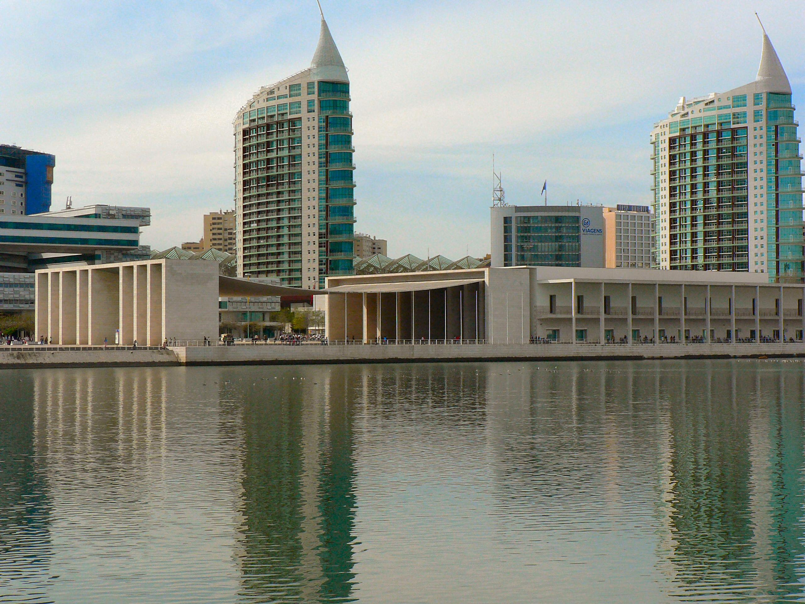 Pavilhão de Portugal no Parque das Nações em Lisboa (Vista do teleférico)